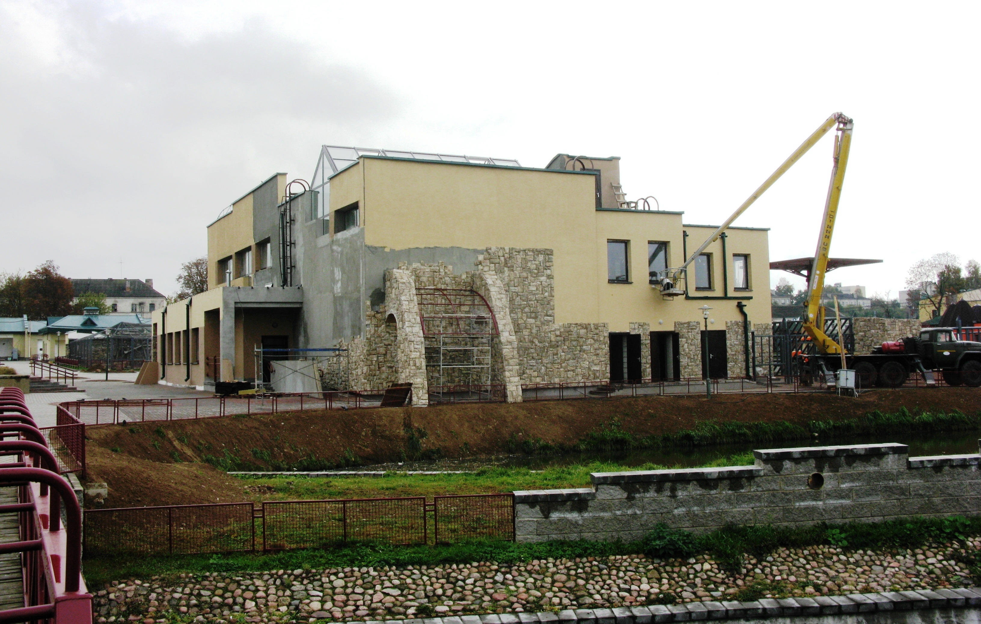 Строительство слоновника в зоопарке города Гродно